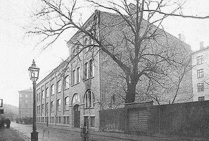 Sveriges kapsylfabrik